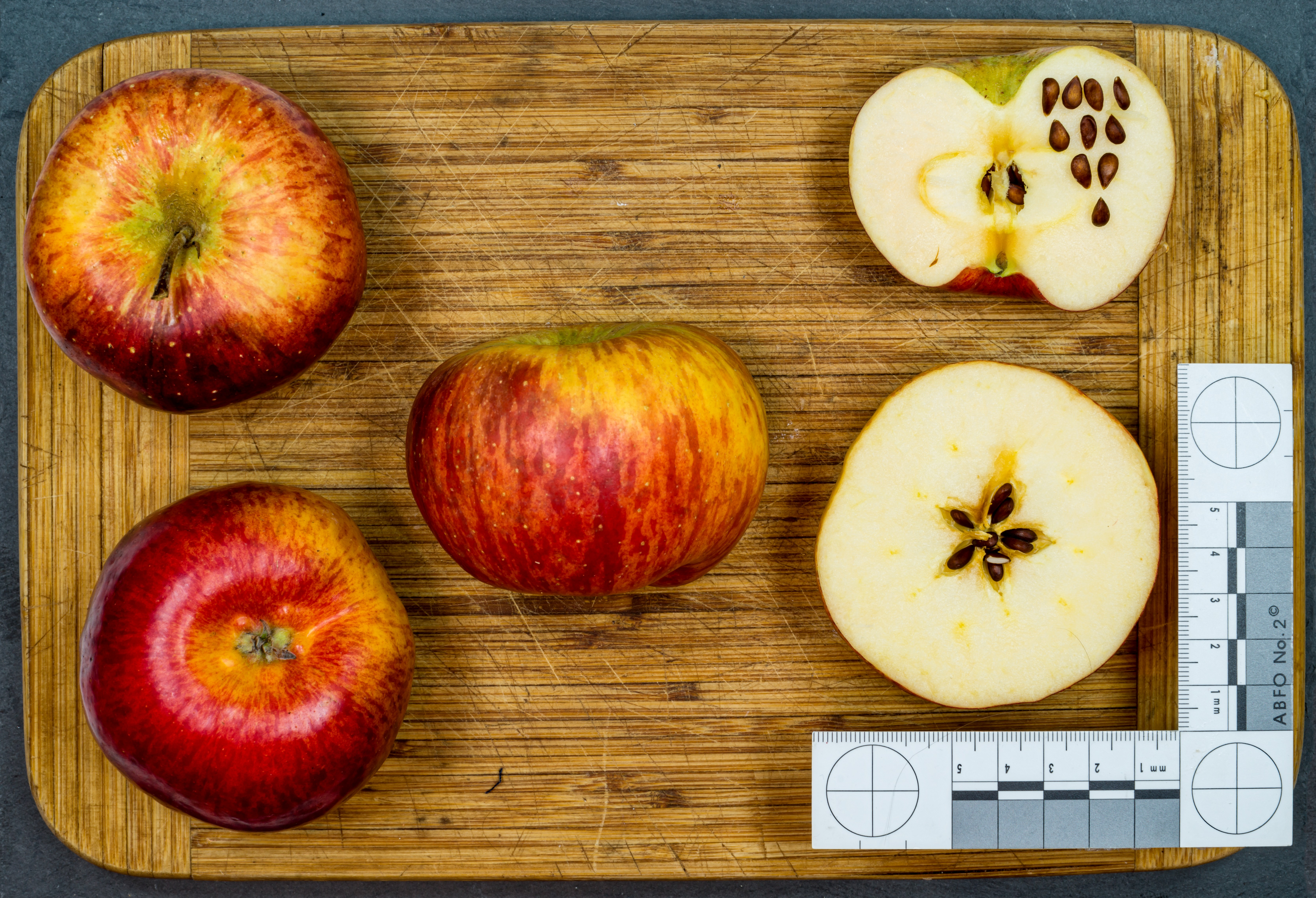 Apfelsorte: Topaz, Topas, geringen Krankheitsanfälligkeit 1984 in Tschechien Rubin × Vanda